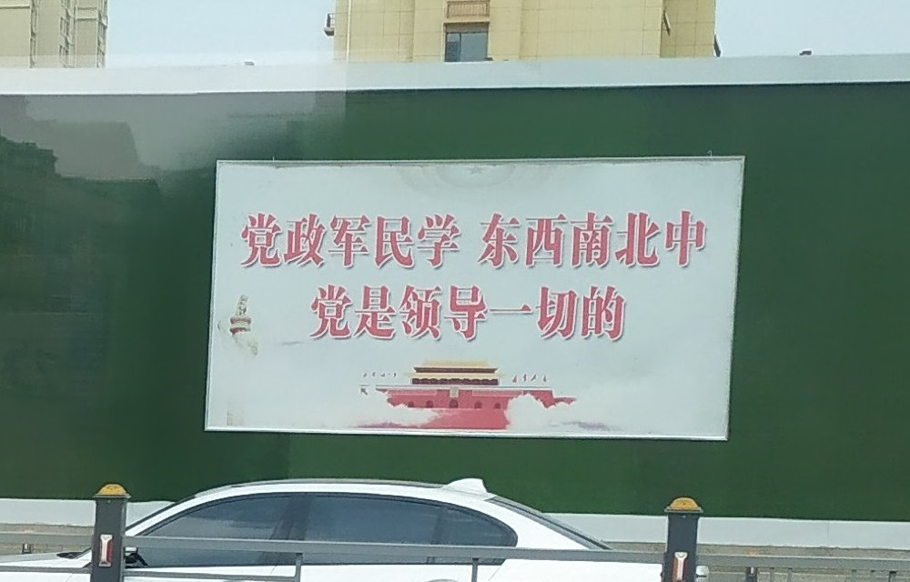 中文（中国大陆）: 烟台市街头的“党领导一切”标牌